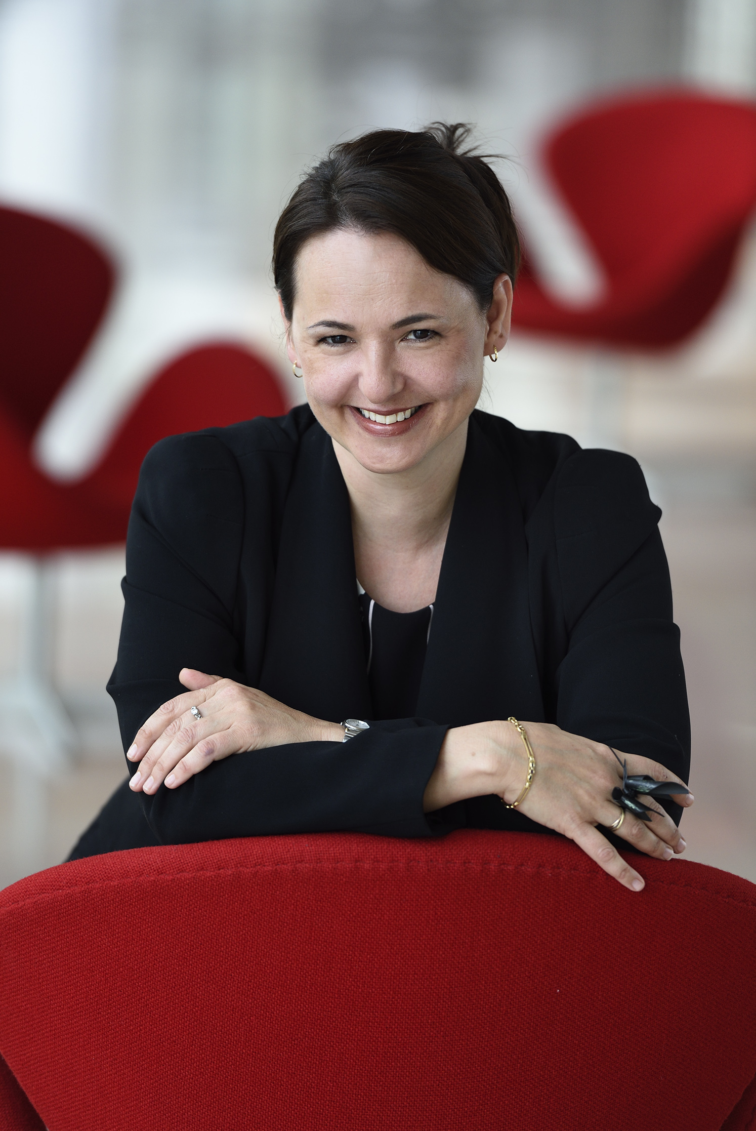 Photo Anne Sérode Radio France